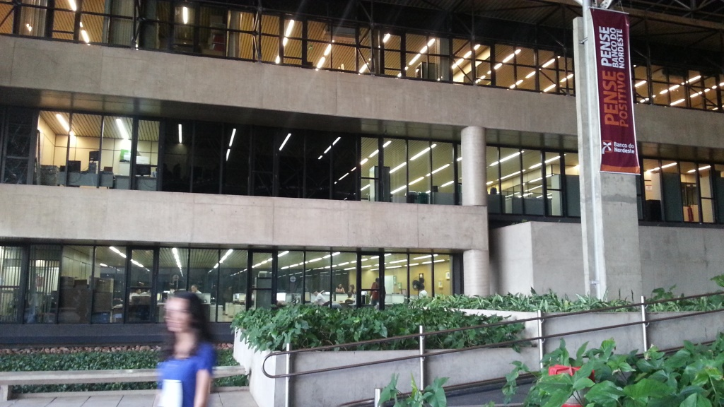 Perspectiva lateral do Bloco D2 (um dos nove blocos existentes) a partir da praça Jader Colares no Centro Administrativo do BNB (CAPGV).